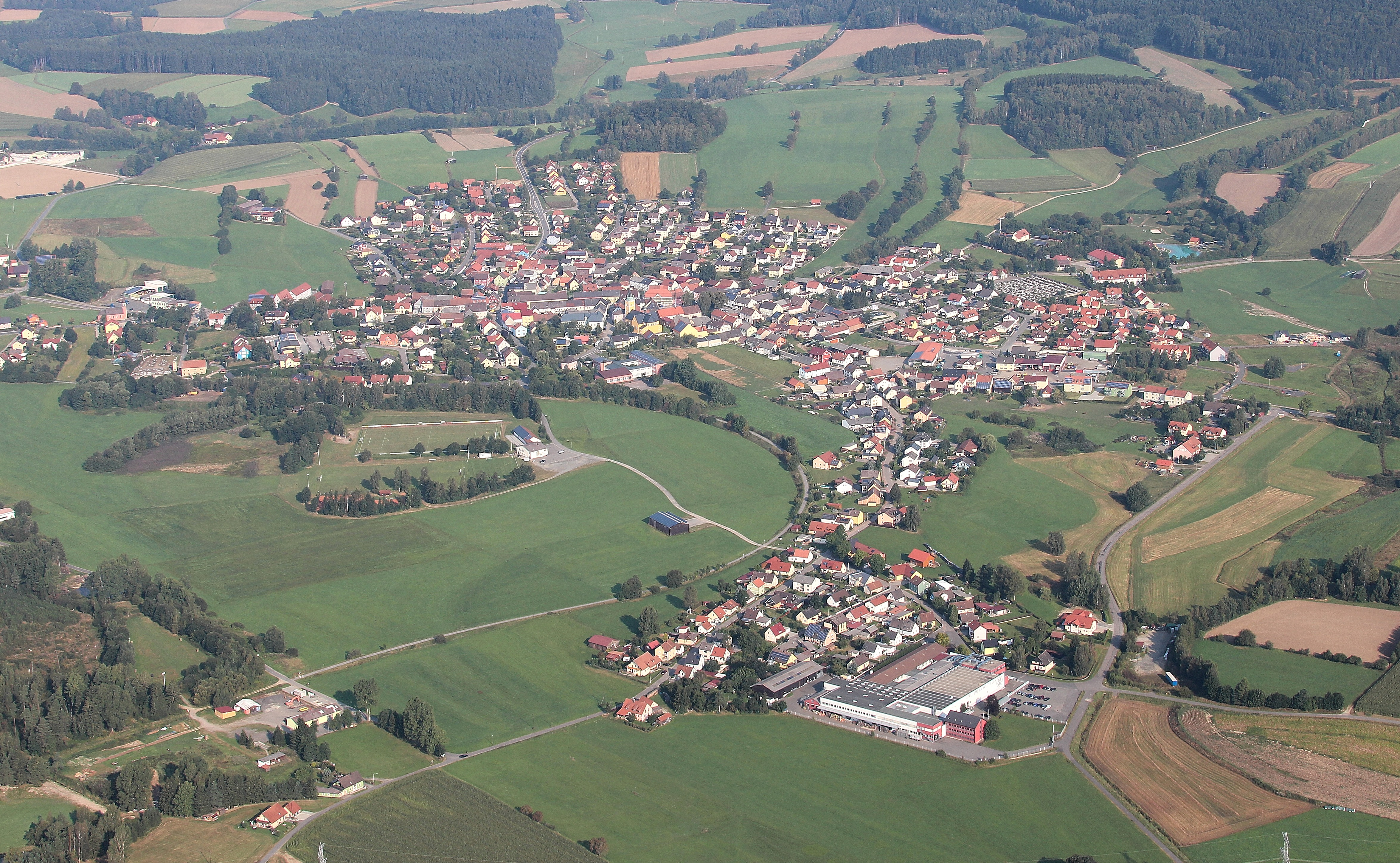 Waidhaus aus der Vogelperspektive; Waidhaus, Landkreis Neustadt an der Waldnaab, Oberpfalz, Bayern